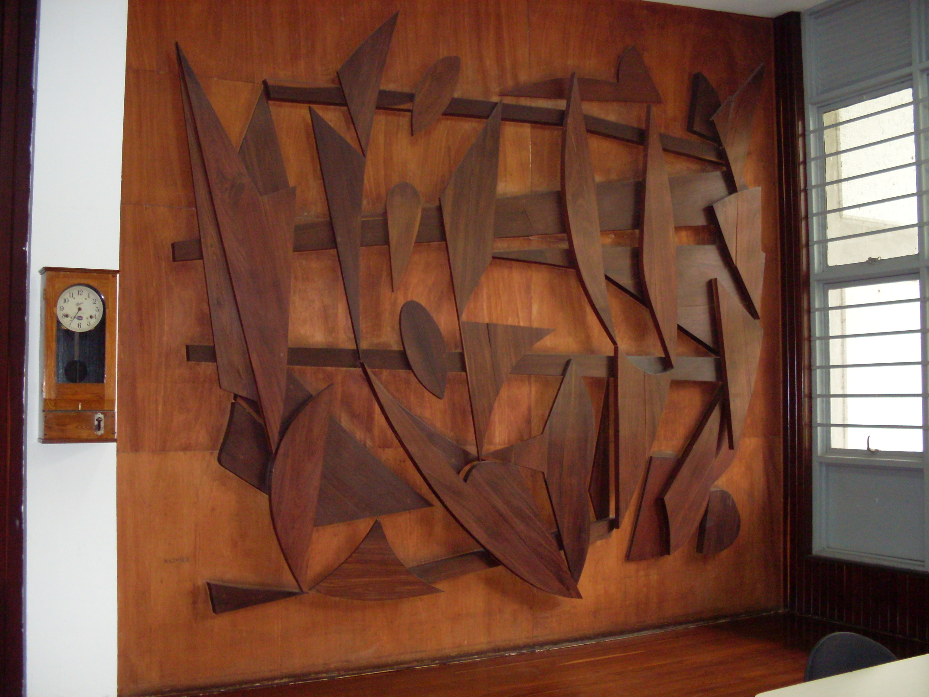 Mural de Francisco Narváez. Título: Sin título. Autor: Francisco Narváez. Año: 1956. Ubicación: Universidad Central de Venezuela. Jardín Botánico, Edificio del Instituto Botánico, Biblioteca.